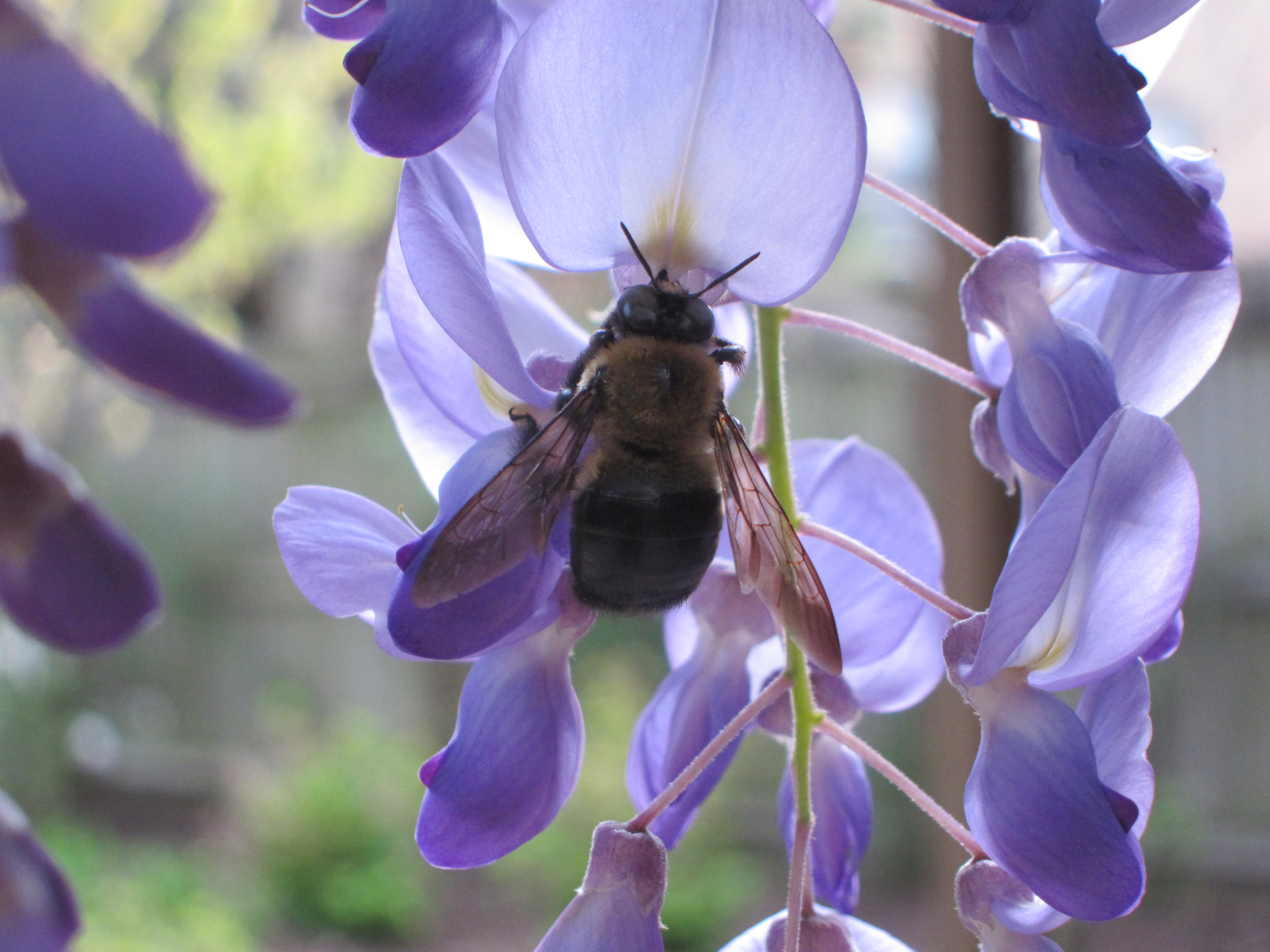 Bee in Wisteria